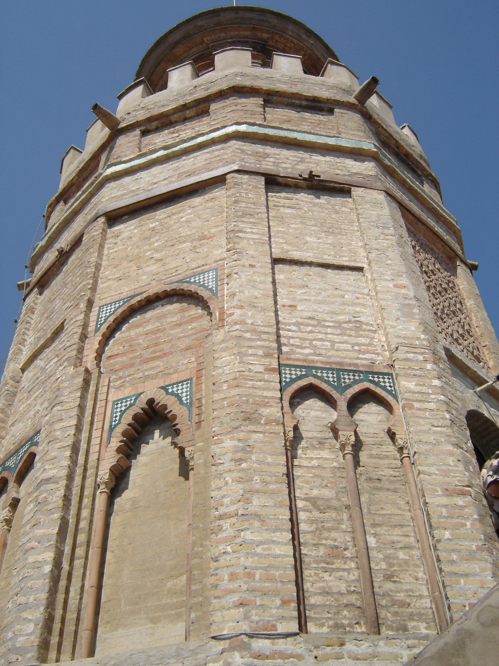 Torre del Oro (Sevilla). Segundo cuerpo